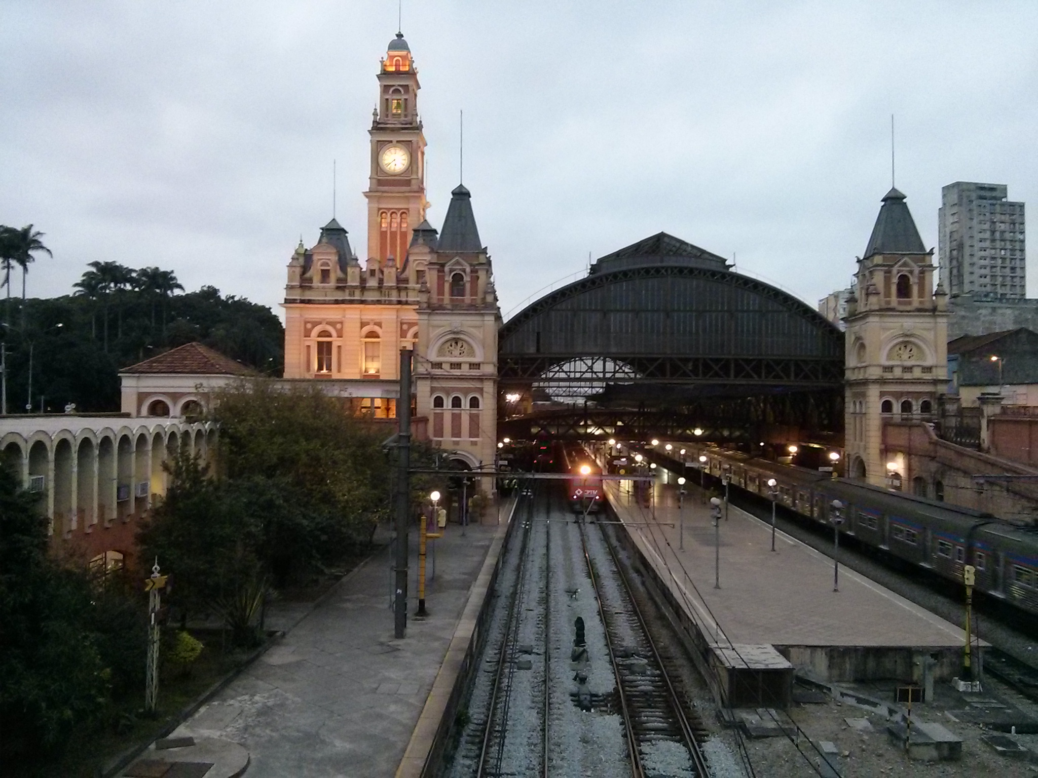 Estação da Luz vista da ponte da rua Mauá.